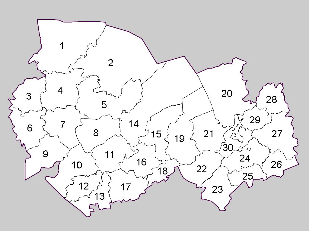 Rajony novosibirskoj oblasti